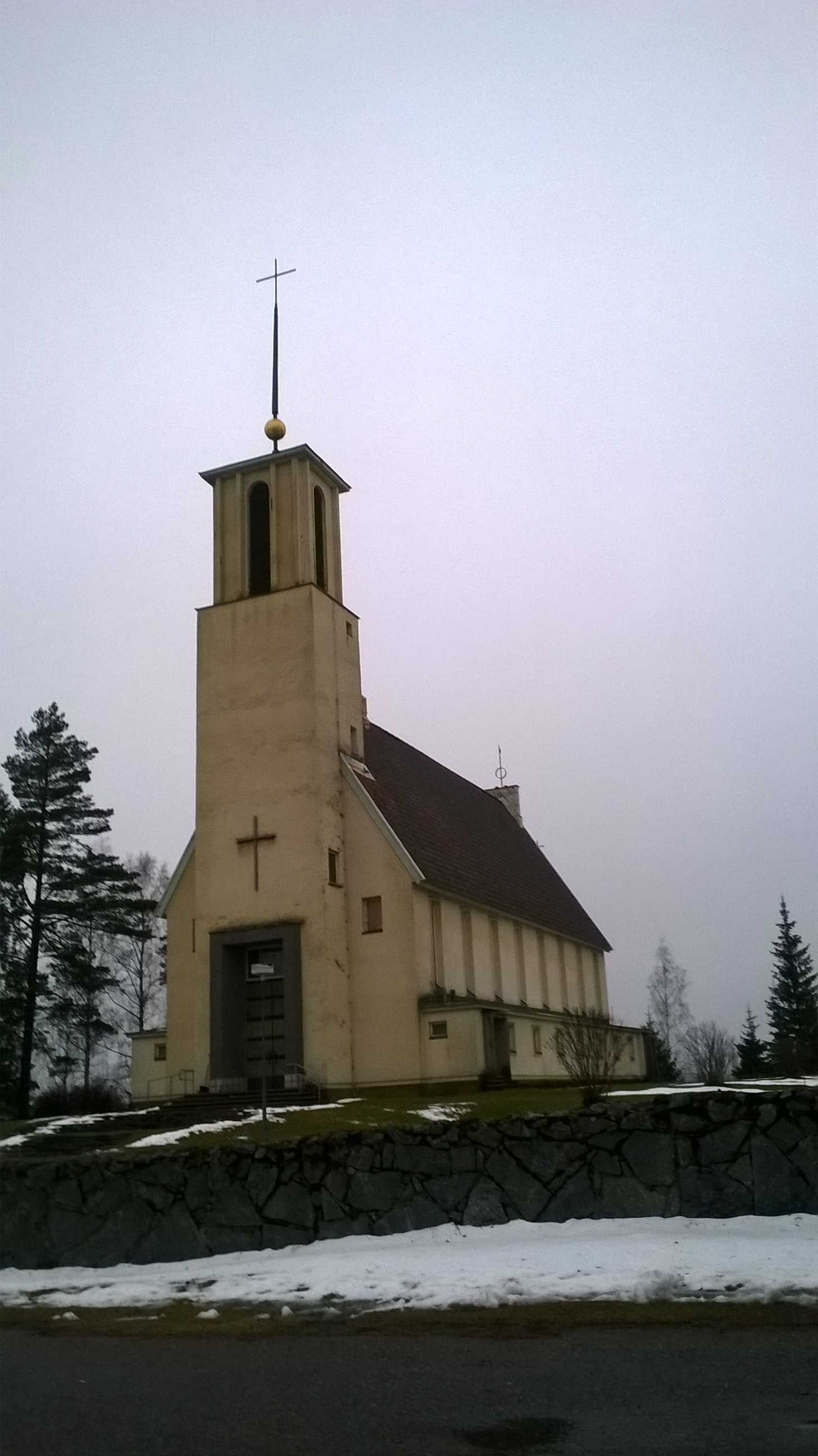 Simpeleen kirkko; kirkko Simpeleellä, joka on osa nykyistä Rautjärveä